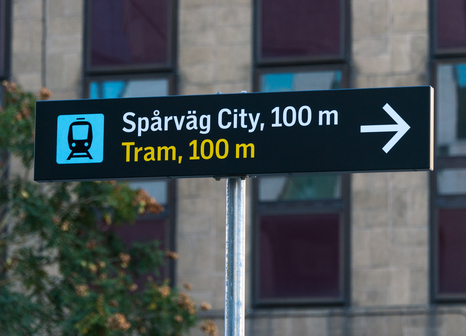 Invigningen av Spårväg Citys nya hållplats vid Klarabergsgatan och därmed förlängning av linjen fram till T-centralen. Den nya hållplatsen T-Centralen blir ny start- och sluthållplats för Spårväg City mot Djurgården.